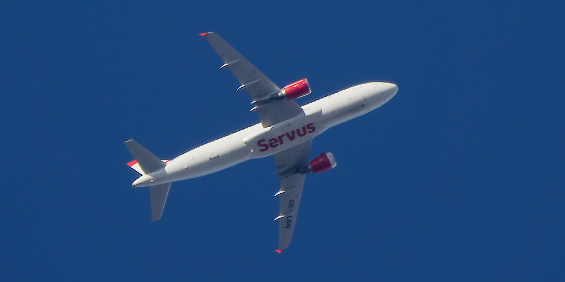 Airbus A320-214 der Austrian Airlines mit der Registriernummer OE-LBN beim Flug von Berlin Tegel (TXL) nach Wien am 21. Oktober 2018 über Berlin-Lichterfelde-Süd.